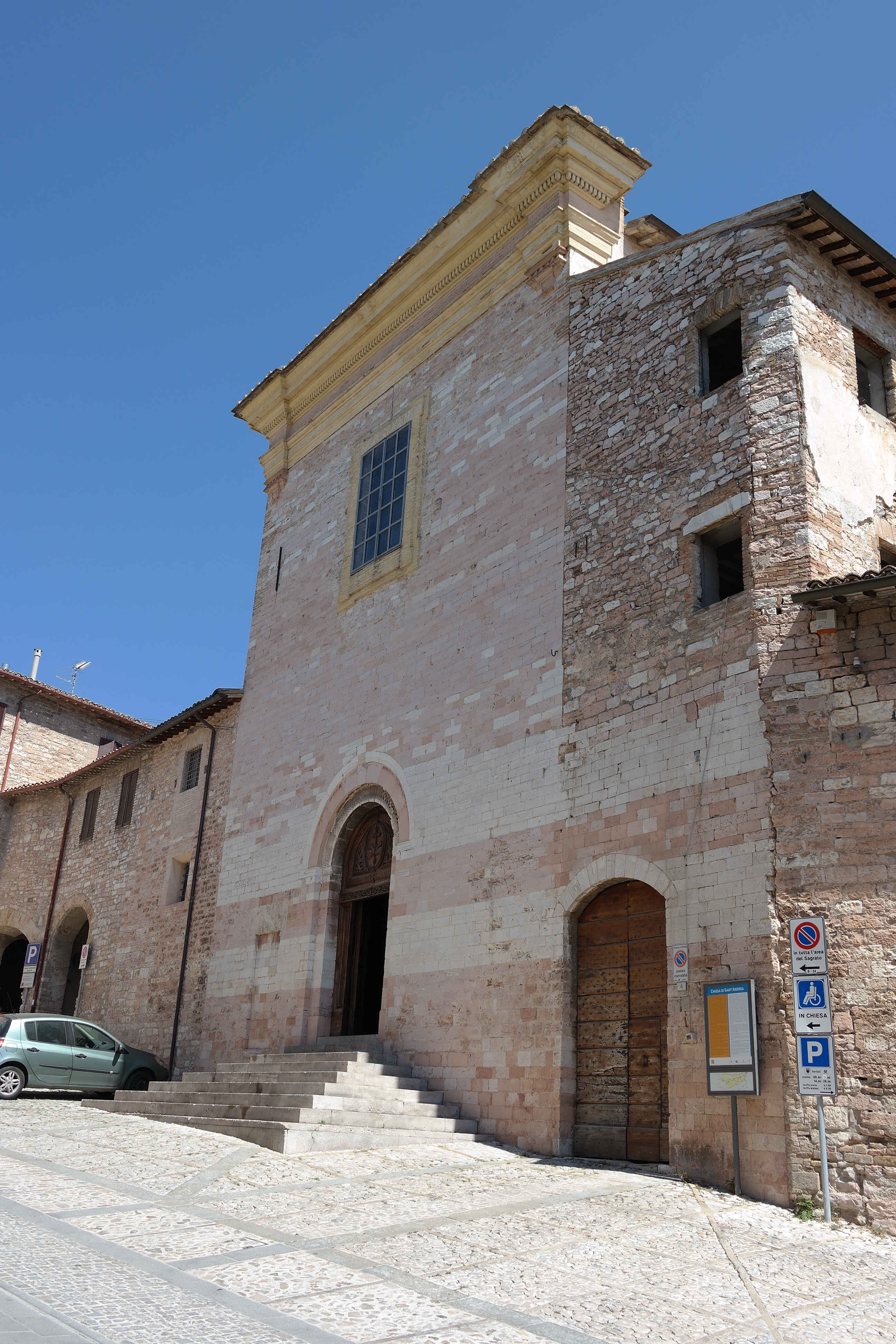 Chiesa di Sant'Andrea a Spello